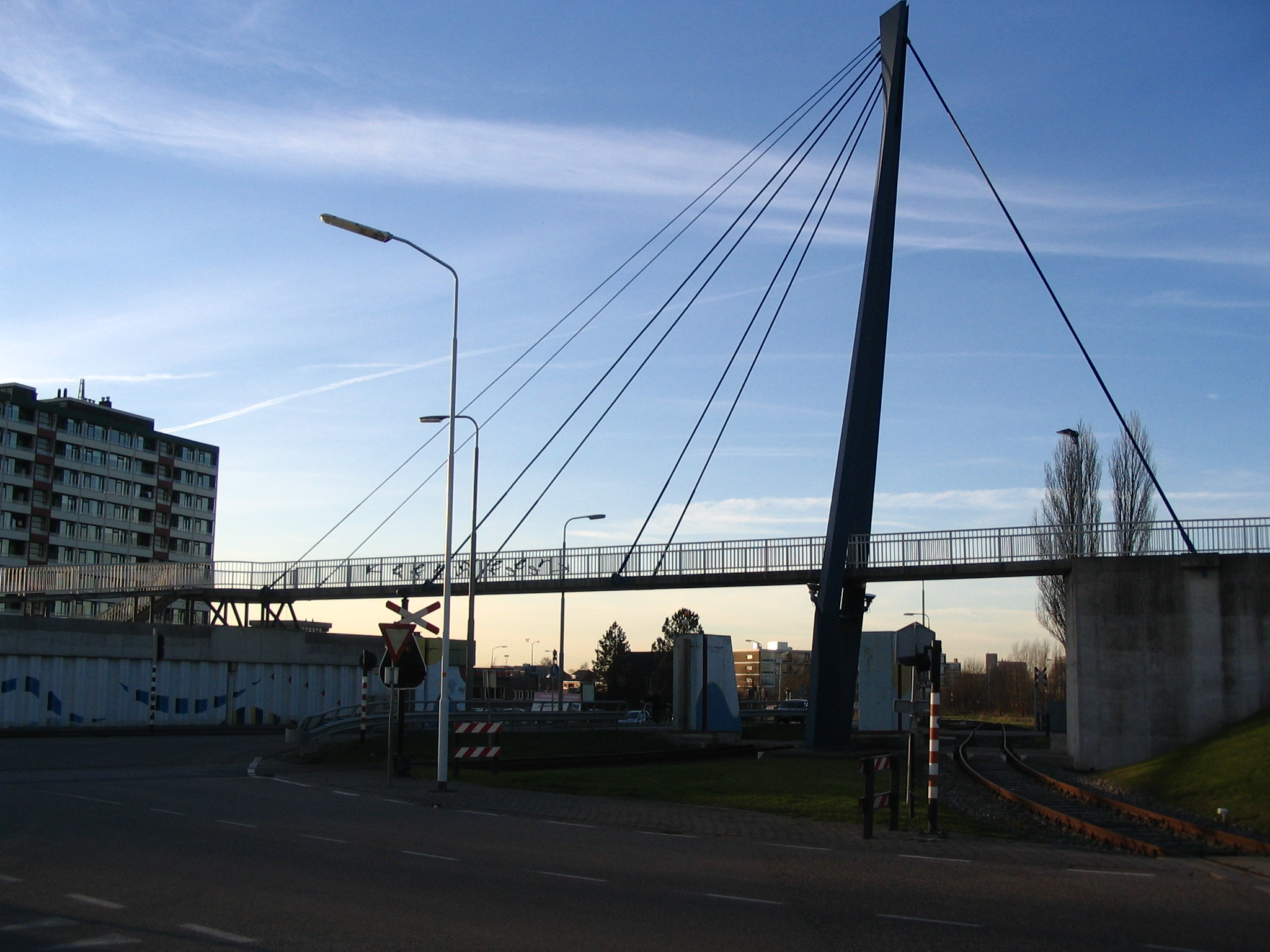 De Keerweer brug in Delfzijl